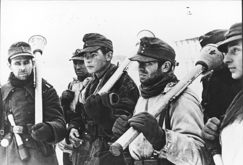 Deutsche Soldaten mit Panzerfäusten Zentralbild, II.Weltkrieg 1939-45 Die Front an der deutschen Ostgrenze, Februar 1945. Mit Panzerfäusten ausgerüstete Angehörige einer Kampfgruppe. [Scherl Bilderdienst]